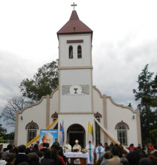 Templo católico ubicado frente a la Plaza San Martín de Corpus Christi